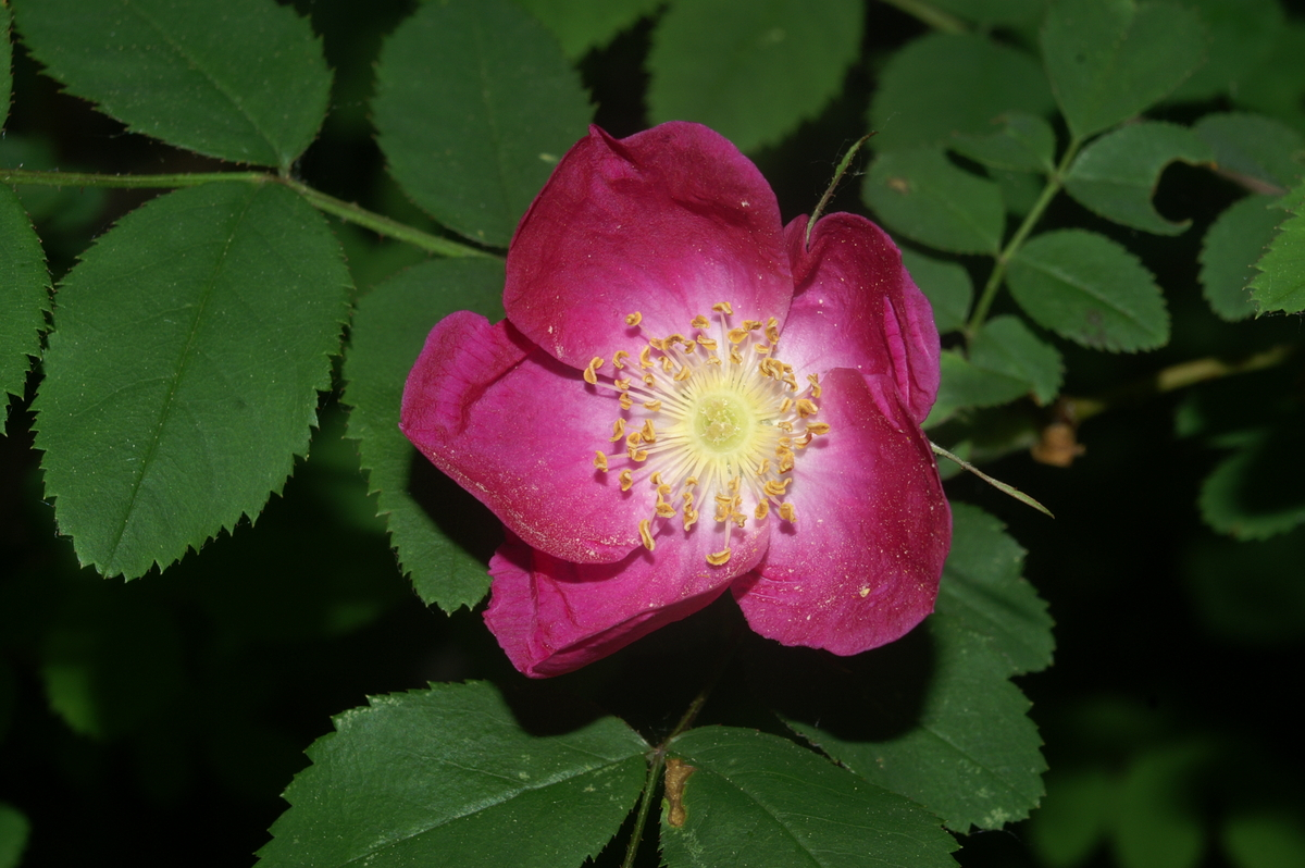 Kimastoplodni ali alpski šipek v Otlici.